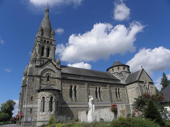 Église St-Étienne de Val-d'Izé (35)